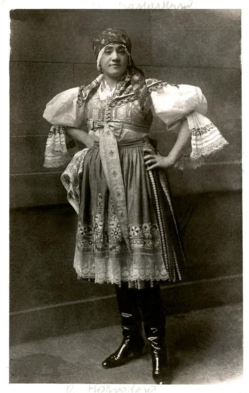 Gabriela Horvátová a l'estrena a Praga de Její pastorkyňa (1916)